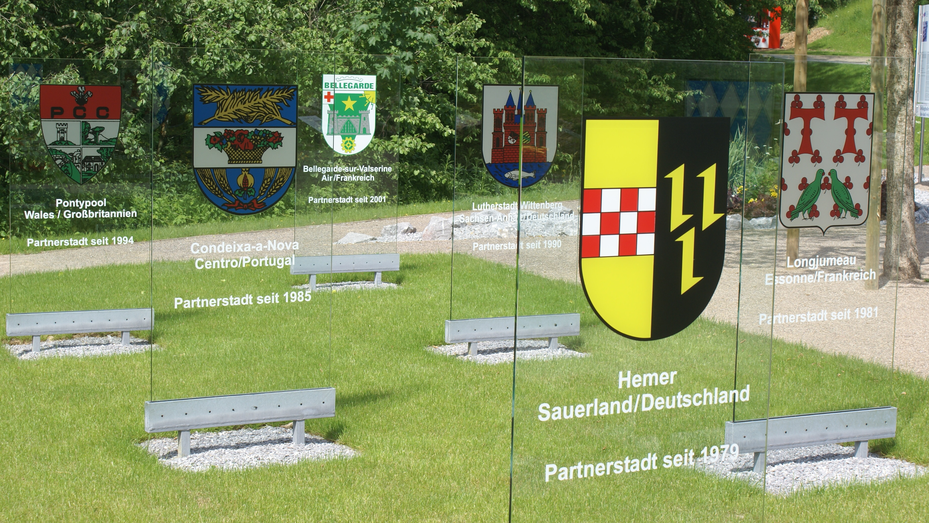 Bretten im Städtemosaik auf der Landesgartenschau Hemer